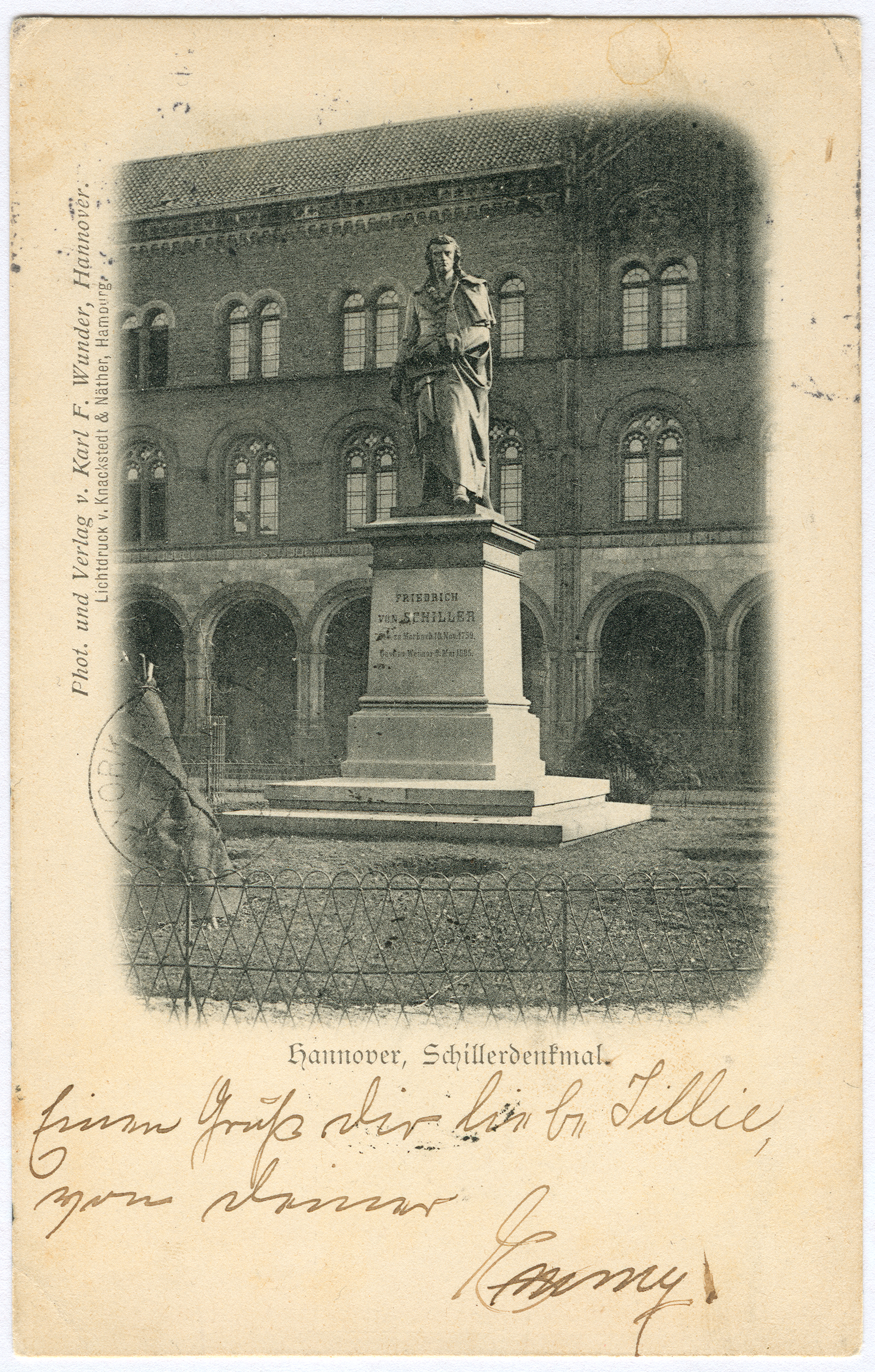 Ansichtskarte nach einem Foto (um 1898) von Karl Friedrich Wunder: Im Vordergrund das umzäunte Schillerdenkmal (Hannover), dahinter das ehemalige Ratsgymnasium am Georgsplatz. In der Vergrößerung der Bildseite (Doppelklick) ist - neben einem Poststempel von New York und einem ominös umhüllten Etwas im Vordergrund links - ein vergleichsweise anderer Sockel als unter dem heutigen Denkmal zu erkennen.